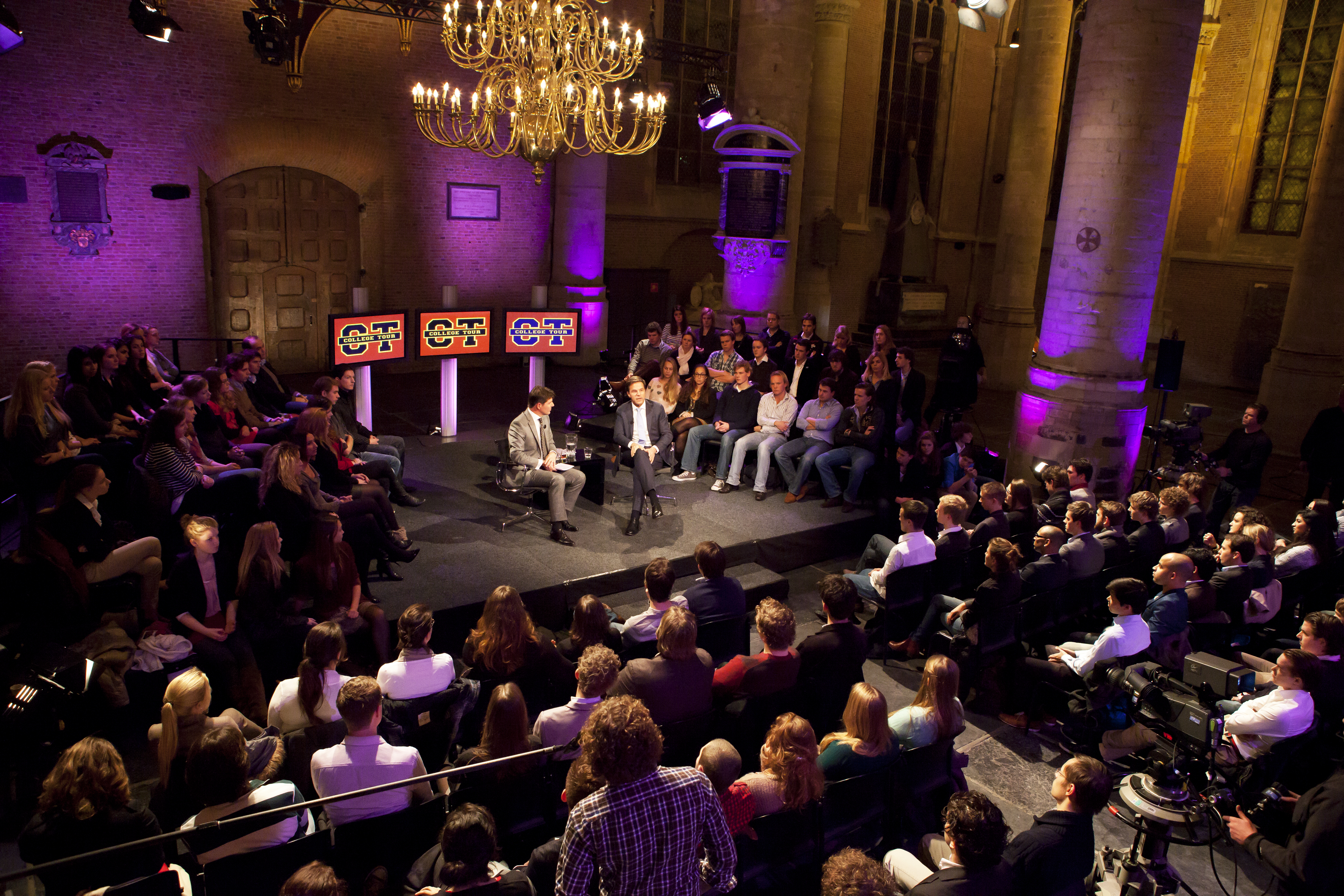 Minister-president Rutte te gast bij College Tour in de Pieterskerk te Leiden. Foto: Barbara de Hosson